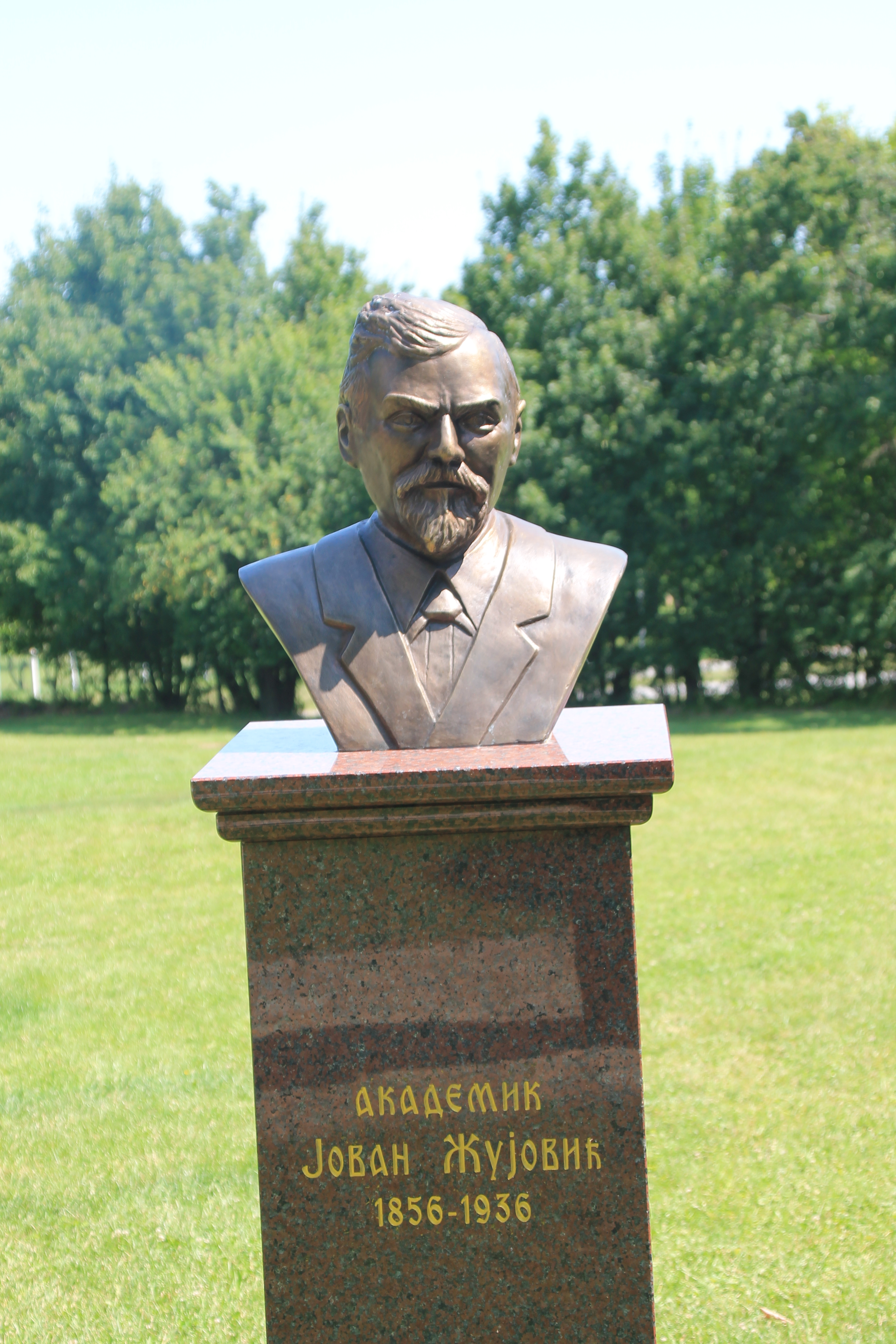 Crkva Sv. Petra i Pavla (Nemenikuće)